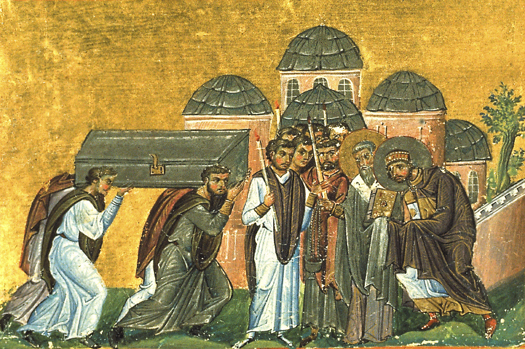 Body of St. John Chrysostom being brought to the Holy Apostles church. Перенесение мощей Иоанна Златоуста в Константинополь в храм святых Апостолов. Примечание: Миниатюра Минология Василия II. Константинополь. 985 г. Ватиканская библиотека. Рим